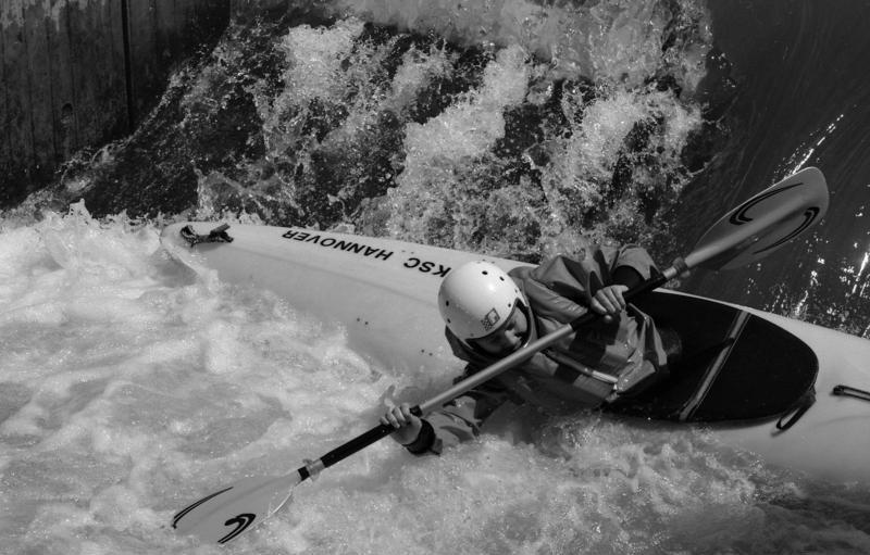 Juni 1988, Hildesheim, Kajak-Training auf der Innerste